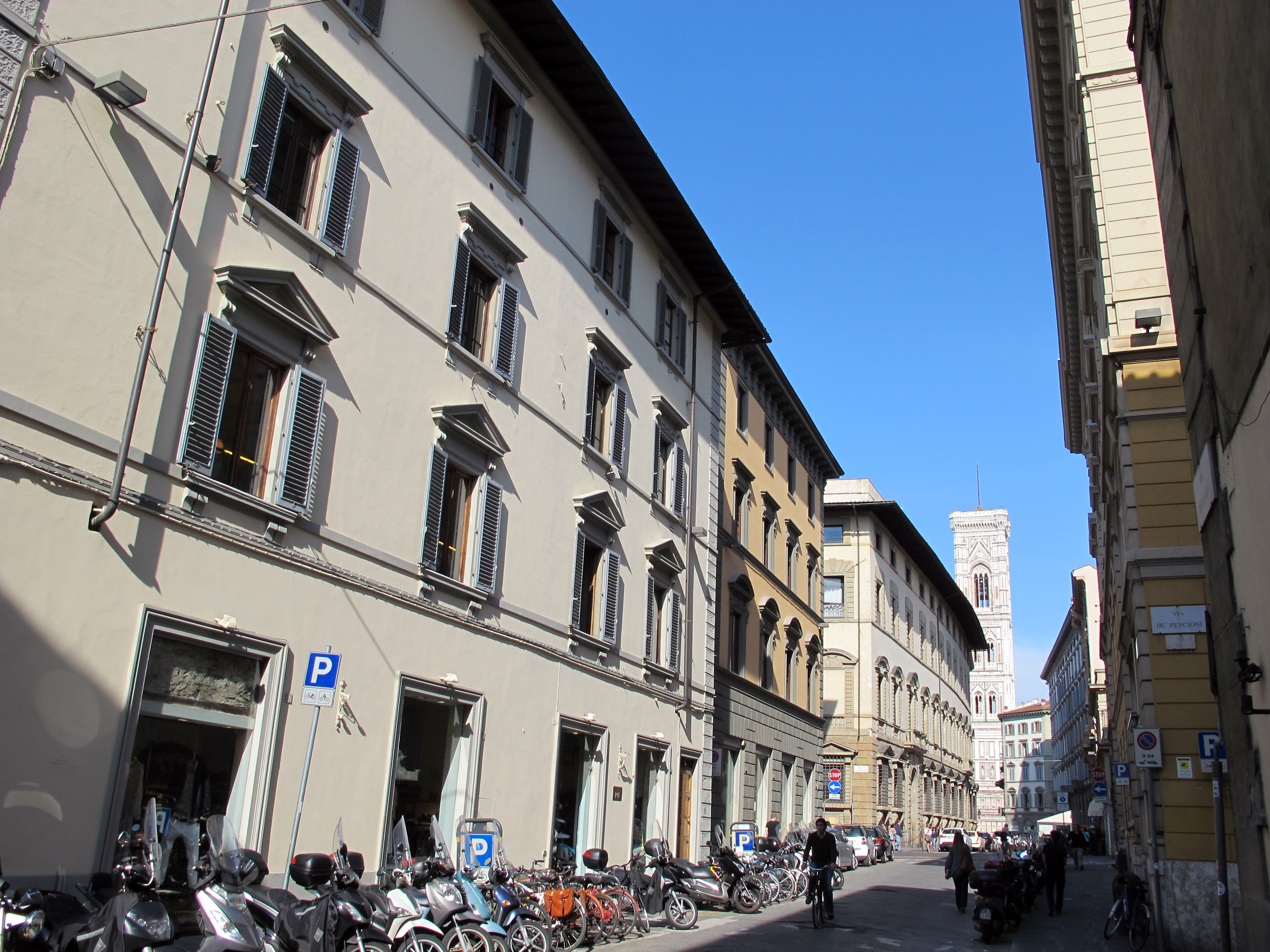 Firenze, miscellanea